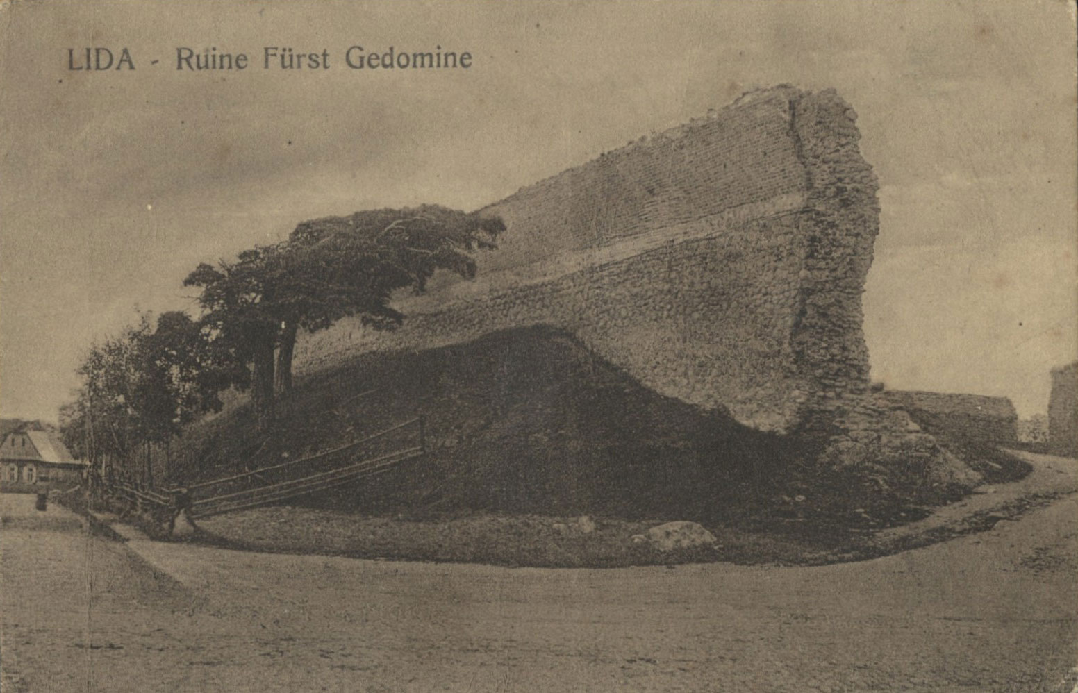 Беларуская (тарашкевіца): Ліда (Lida). Замак